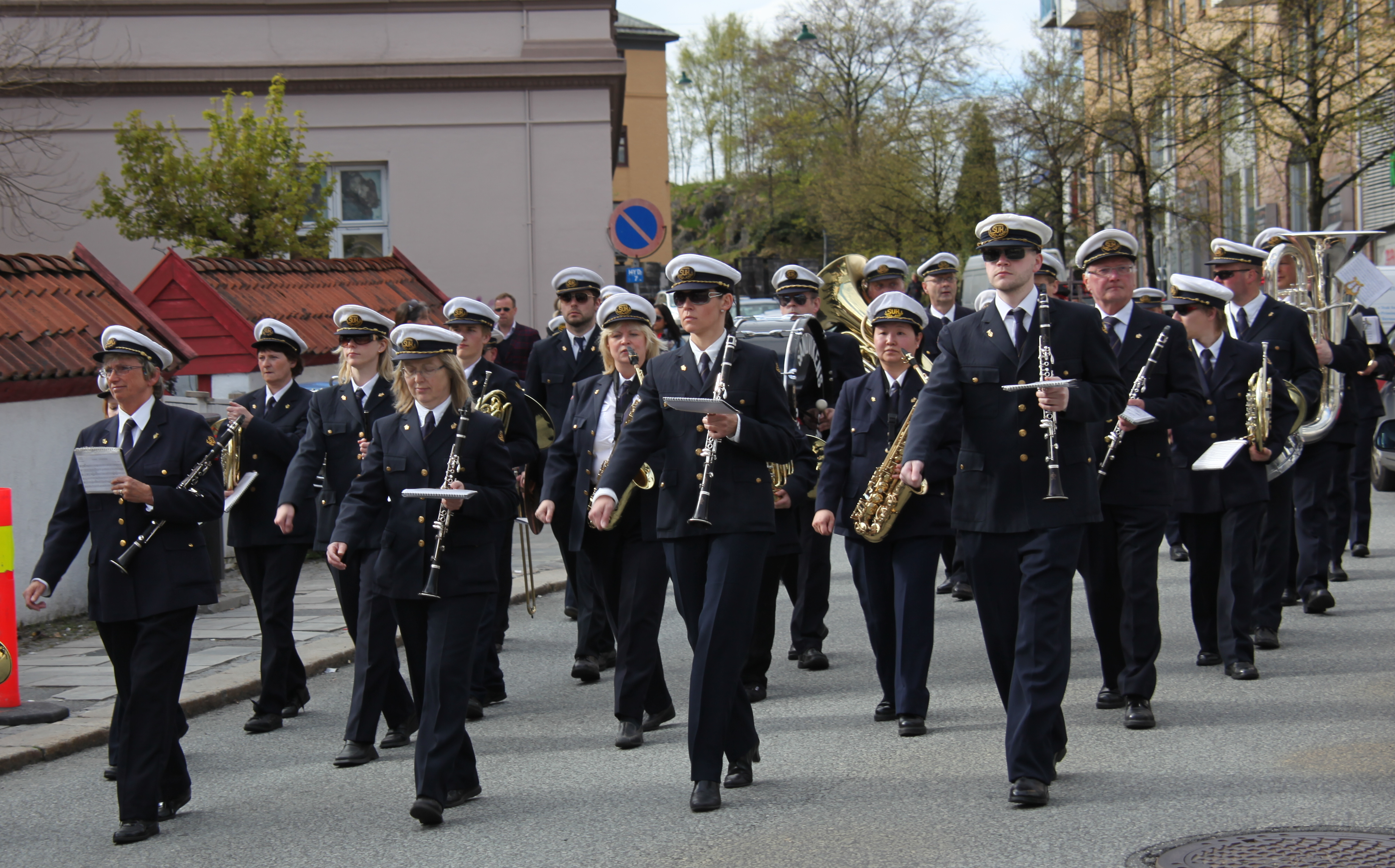 Sandvikens Ungdomskorps